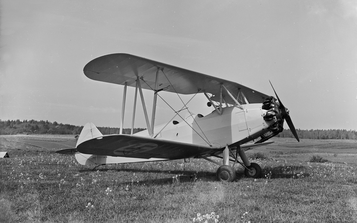 VL Viima II VI-2 -alkeiskoulukone Tampereella kesäkuussa 1938. VI-2 oli II-tyyppiä ja rakennettiin uudessa Valtion Lentokonetehtaan Tampereen tehtaassa syksyllä 1937. Ensilennon suoritti Jorma Visapää 12.10.1937.